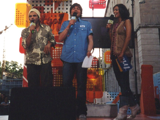 Roma, Largo Augusto Imperatore, 16 giugno 2004. Federico Russo e Giorgia Surina, VJ di MTV, conducono Total Request Live in diretta con ospite Francesco Renga.